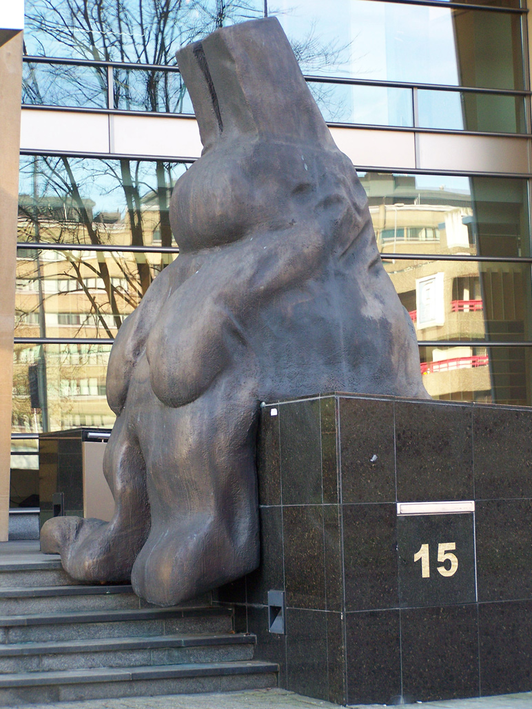 Sculpture Zittend Konijn (Sitting Rabbit) by Tom Claassen in front of the entrance of Nederlandse Postkantoren BV in Utrecht. Placed in 1999.